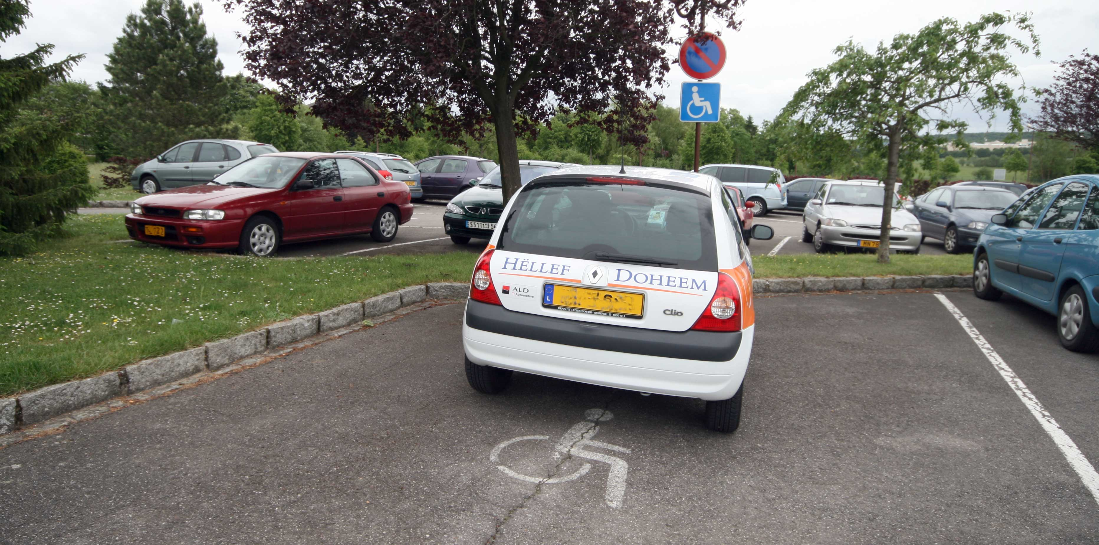 Handikapéierteparkplaz.